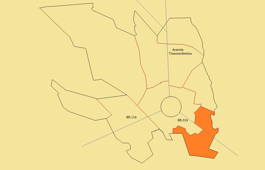 Distrito Humildes em cor laranja, em Feira de Santana, Bahia, Brasil.